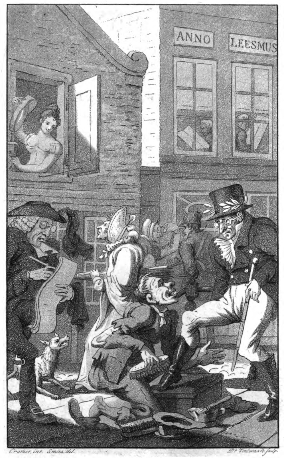 Prent 'Leden van de Snaaksche Vergadering' door Daniël Veelwaard (1766-1851), uit De bogchels mijner luimen van Anton Cramer (publicatie uit 1822)